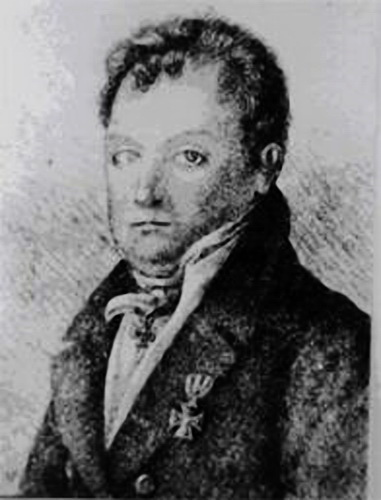 Беларуская (тарашкевіца): Ян Ходзька-Барэйка